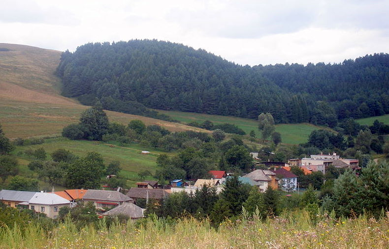 Popis: Sedlice Bajerovská ulica Zdroj: Archív autora Dátum: 13.8.2006 Autor: Ing.Mgr.Jozef Kotulič Iné verzie tohto súboru: Nie sú